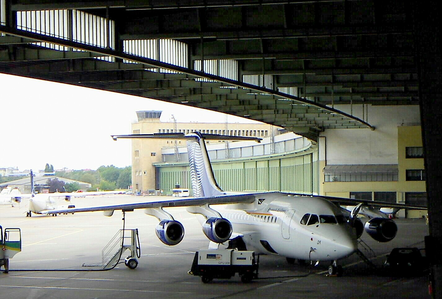 BAe 146, Brussels Airlines, Airport Berlin Tempelhof, 2004